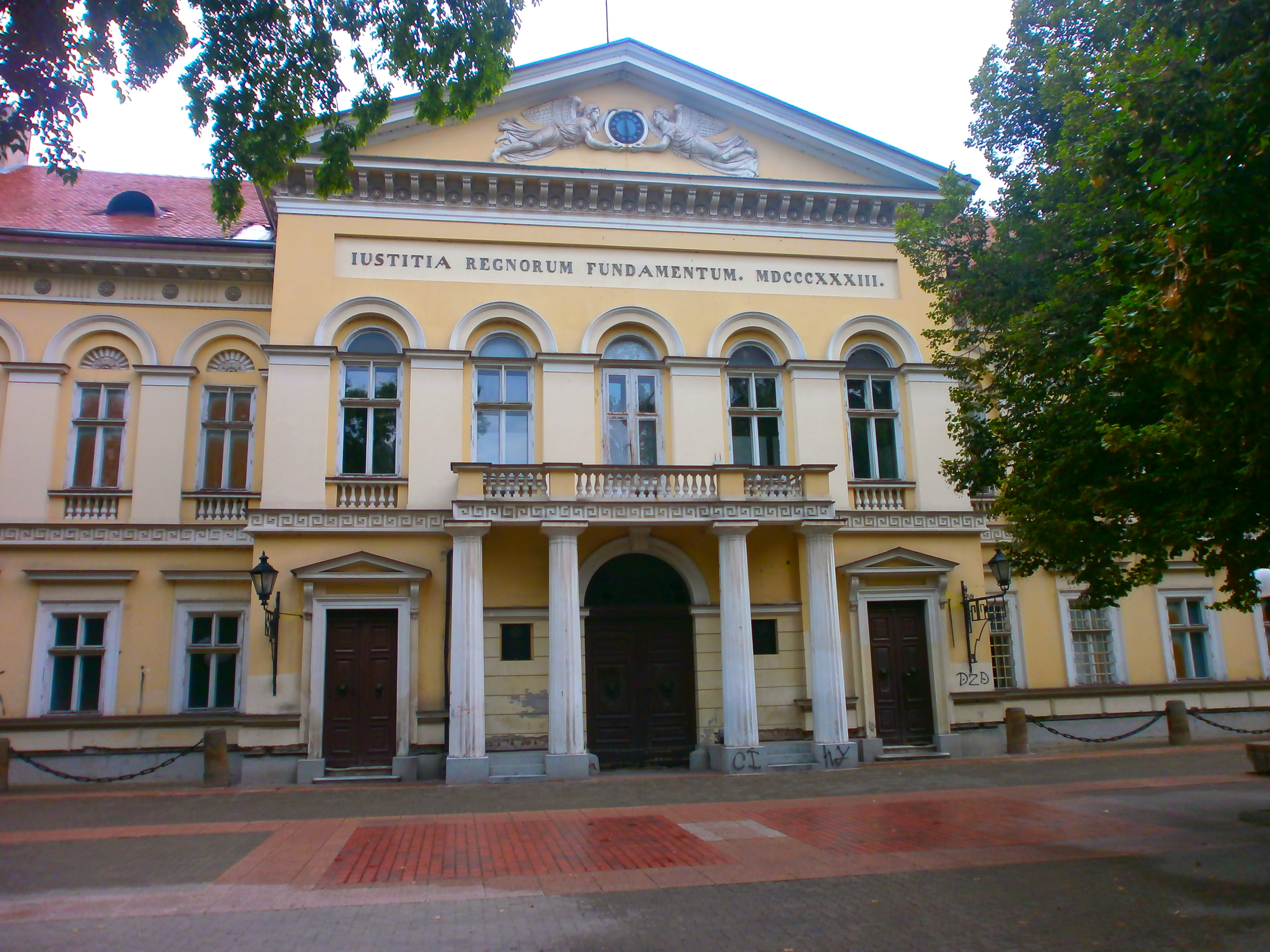 Зграда Магистрата у Панчеву, садашњи градски музеј.